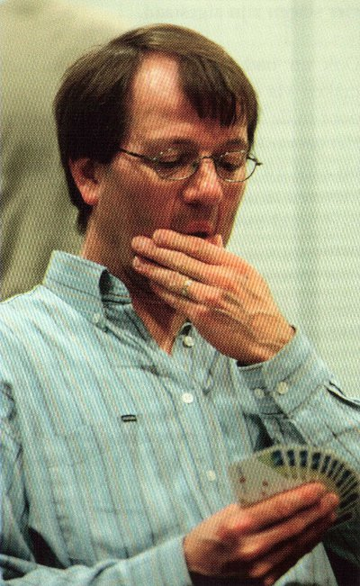 Foto Hans van de Haar.